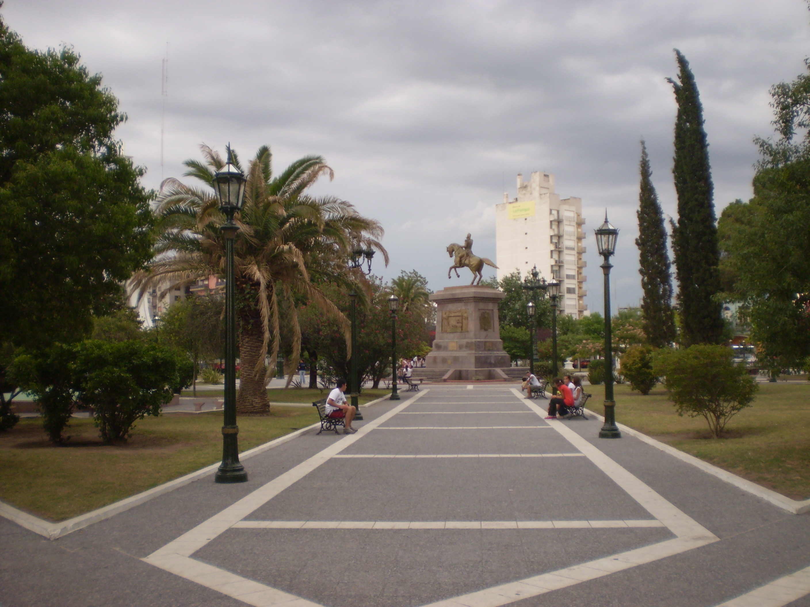 Santa Rosa, La Pampa, Argentina, main square, San Martín monument